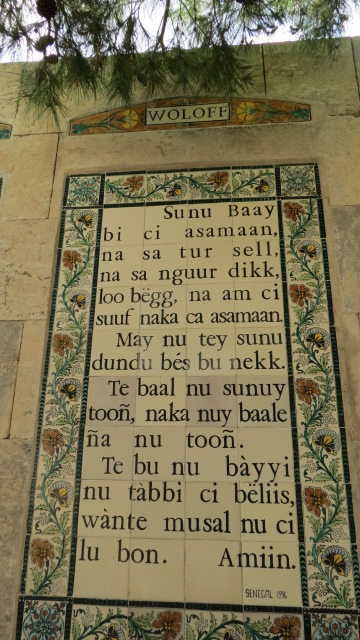 Church of the Pater Noster, Mount of Olives, Jerusalem כנסיית אבינו שבשמים Sanctuary of the Eleona